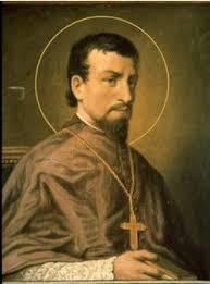 Antoine Daveluy, évêque missionnaire en Corée et martyr.